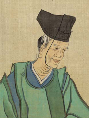 柴野栗山肖像『近世名家肖像』より